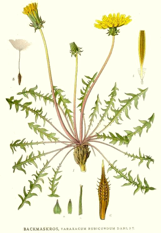 Taraxacum sect. Erythrosperma (H. Lindb.) Dahlst., syn. Taraxacum rubicundum (Dahlst.) Dahlst. Original Description Backmaskros, Taraxacum rubicundum Dahlst.